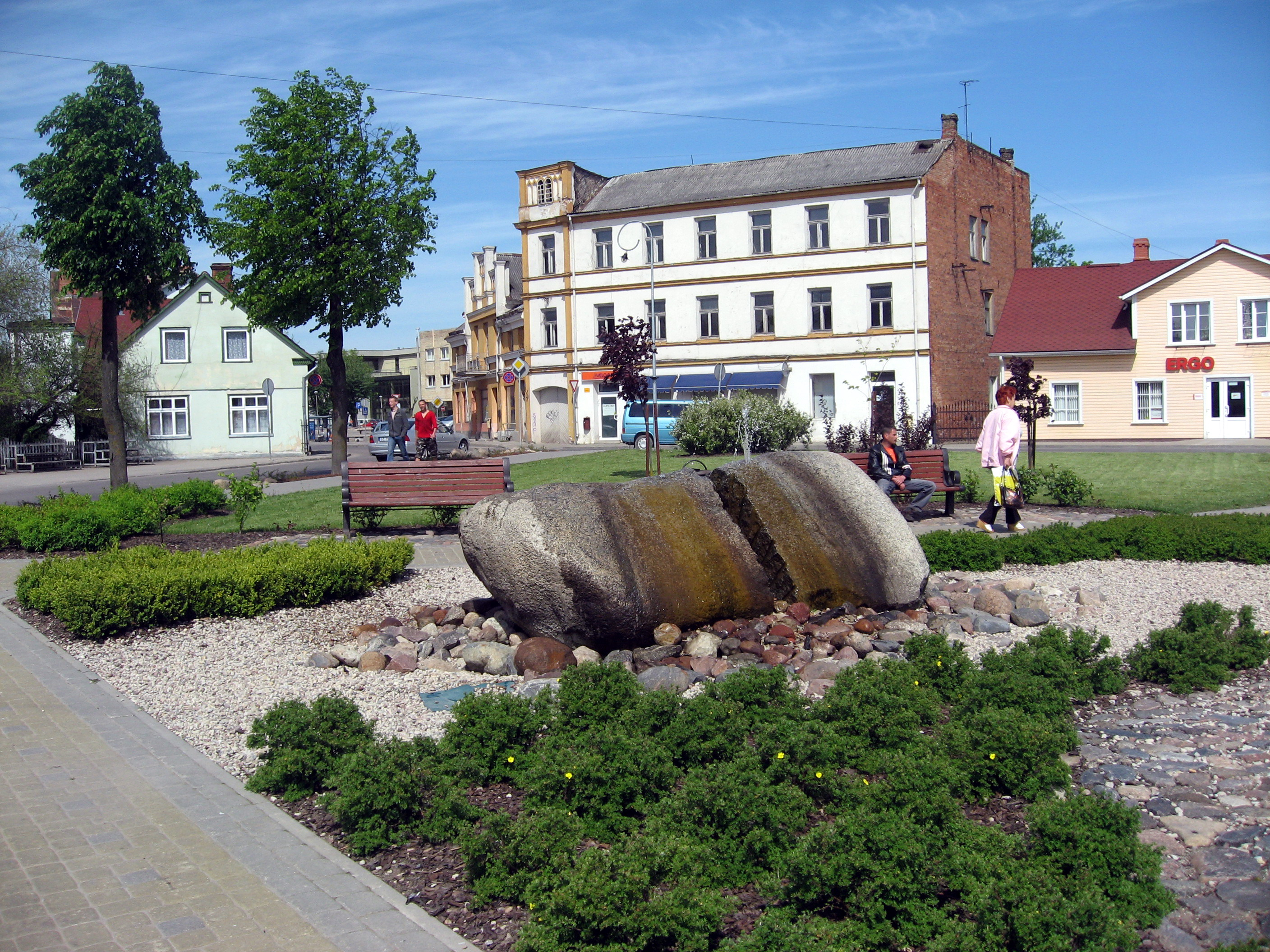 Tukums